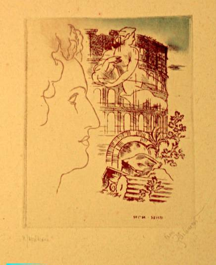 И. И. Нивинский. Фронтиспис к книге И. В. Гёте «Римские элегии». Цветной офорт. 1933.